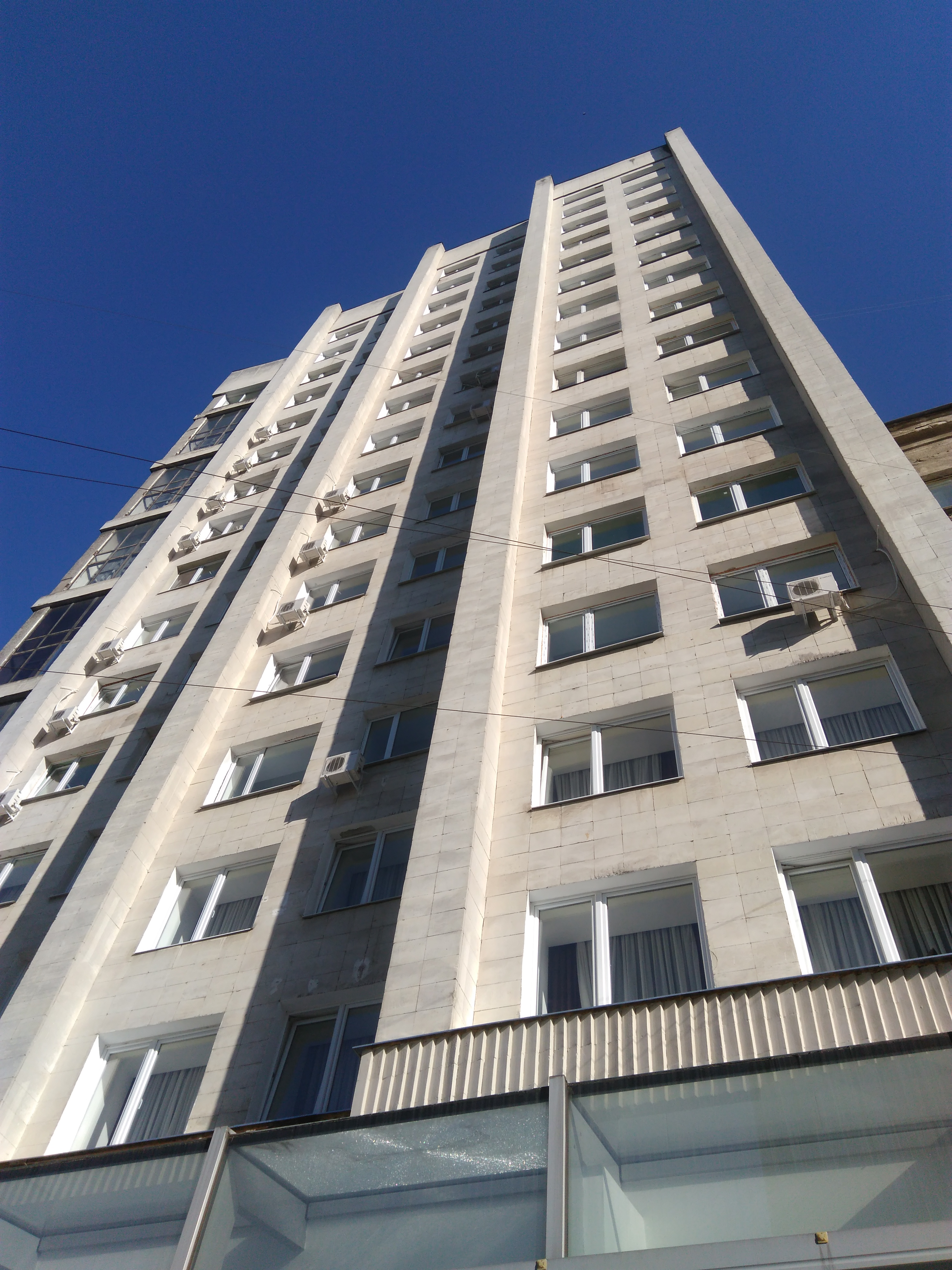 Фото 16-ти поверхового корпусу готелю Харків, Харків (арх. Клейн Б. Г., Н. С. Фурманова, 1976)